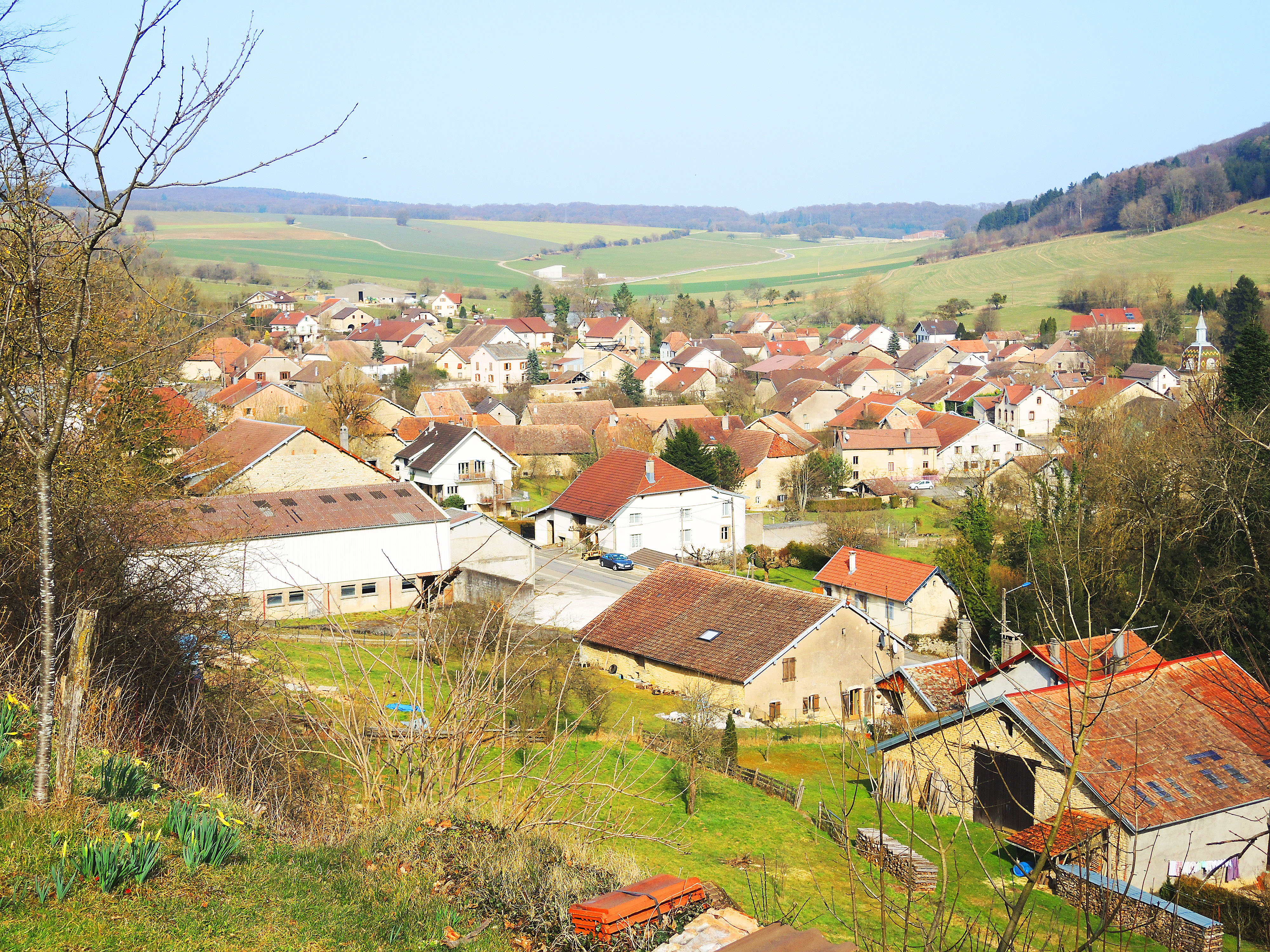 Panorama sur Soye. Département du Doubs.